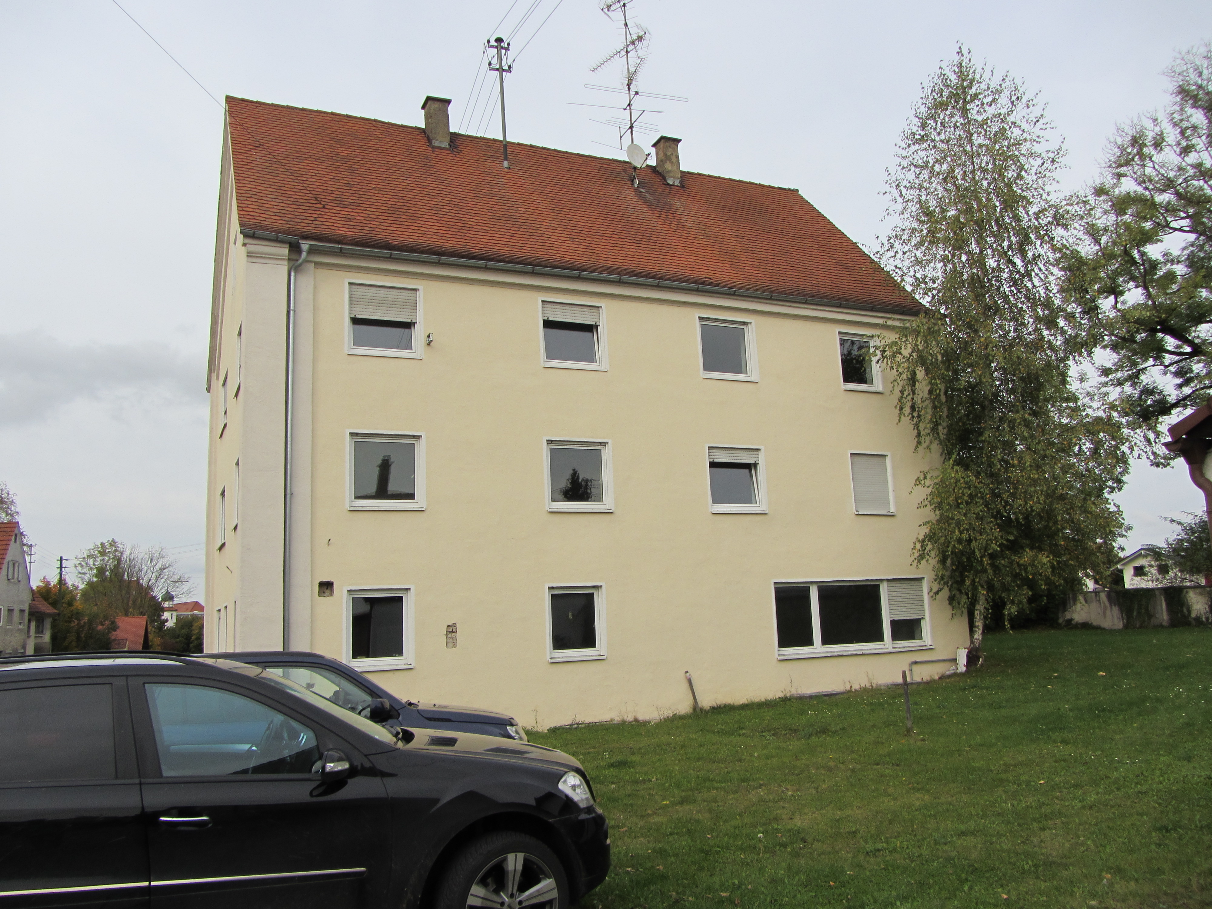 Ehemalige jüdische Synagoge (Fellheim)